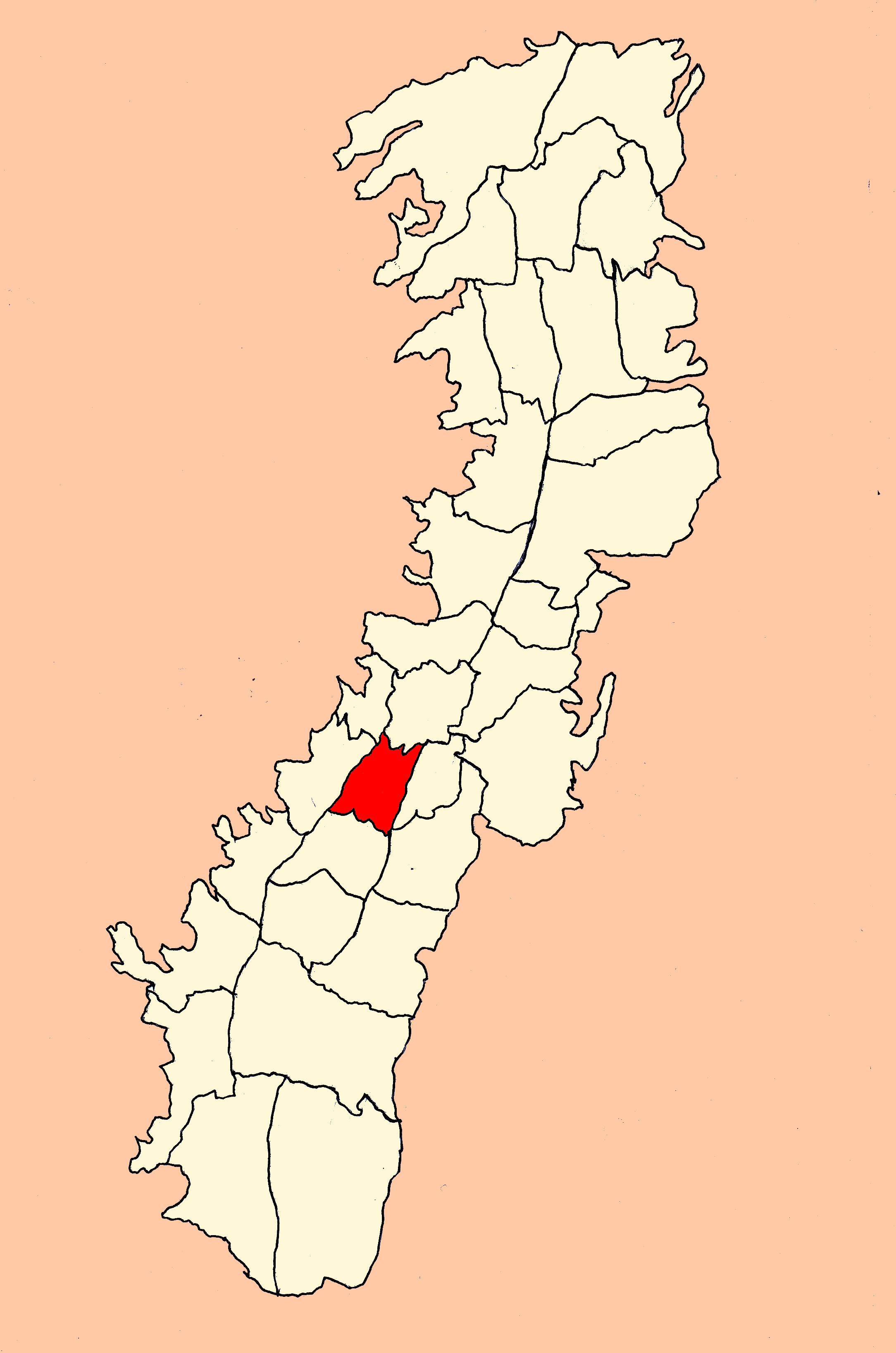 Parroquia Magdalena (Quito, Ecuador)